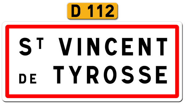 Panneau d'entrée d'agglomération